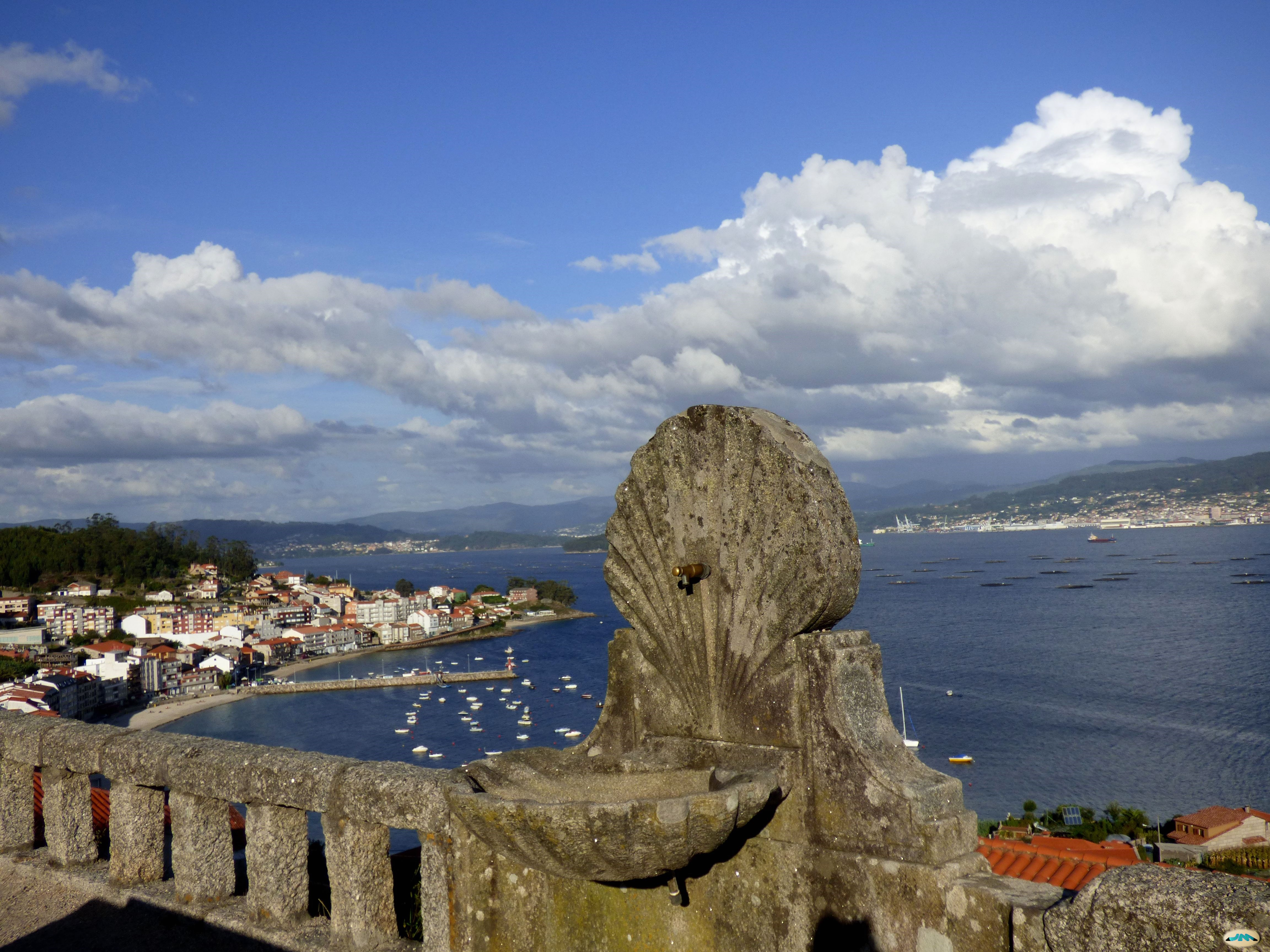 Fuente de Dorrón. Mirador da Granxa.